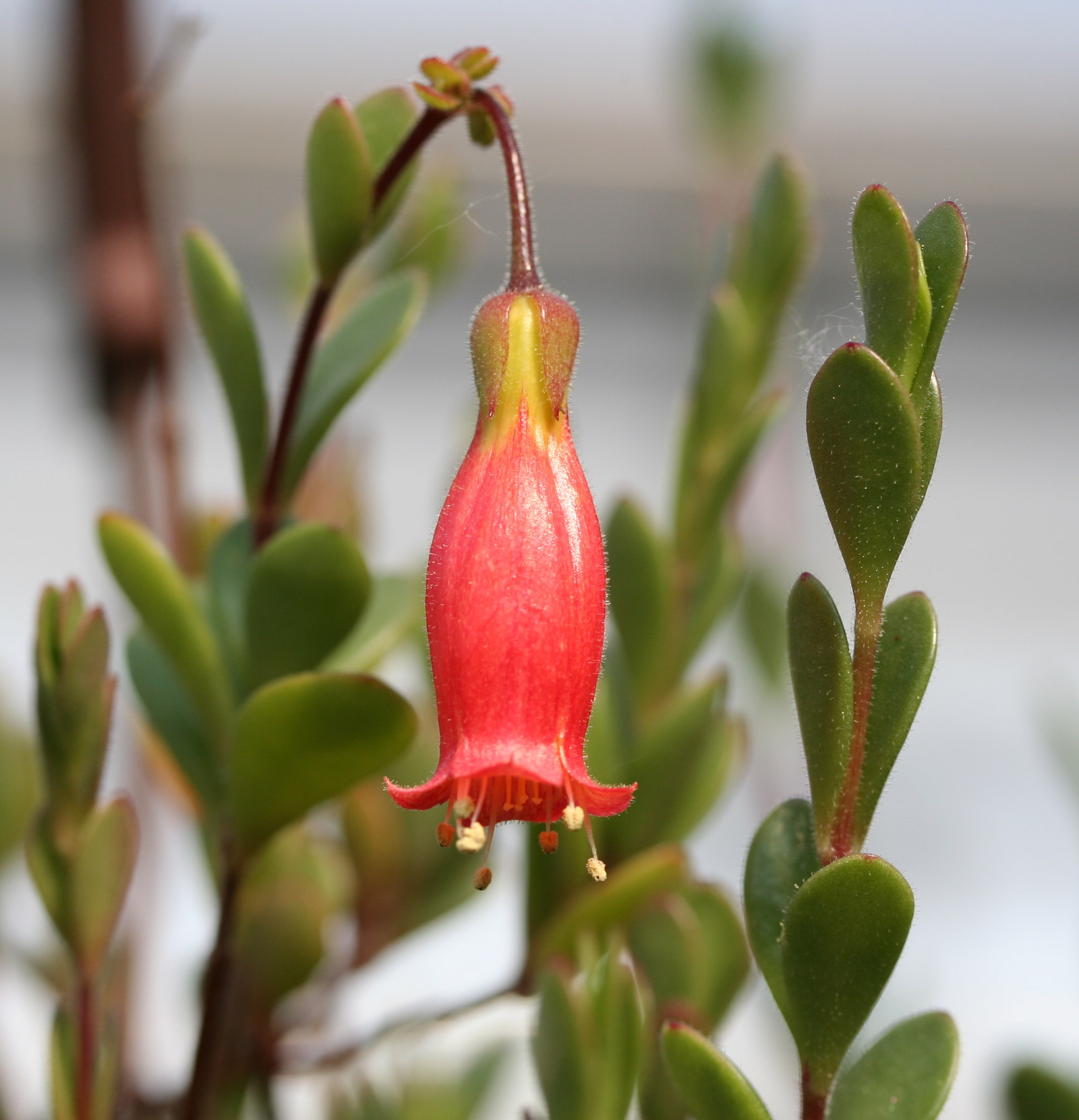 Kalanchoe manginii bei Kakteen-Haage, Erfurt